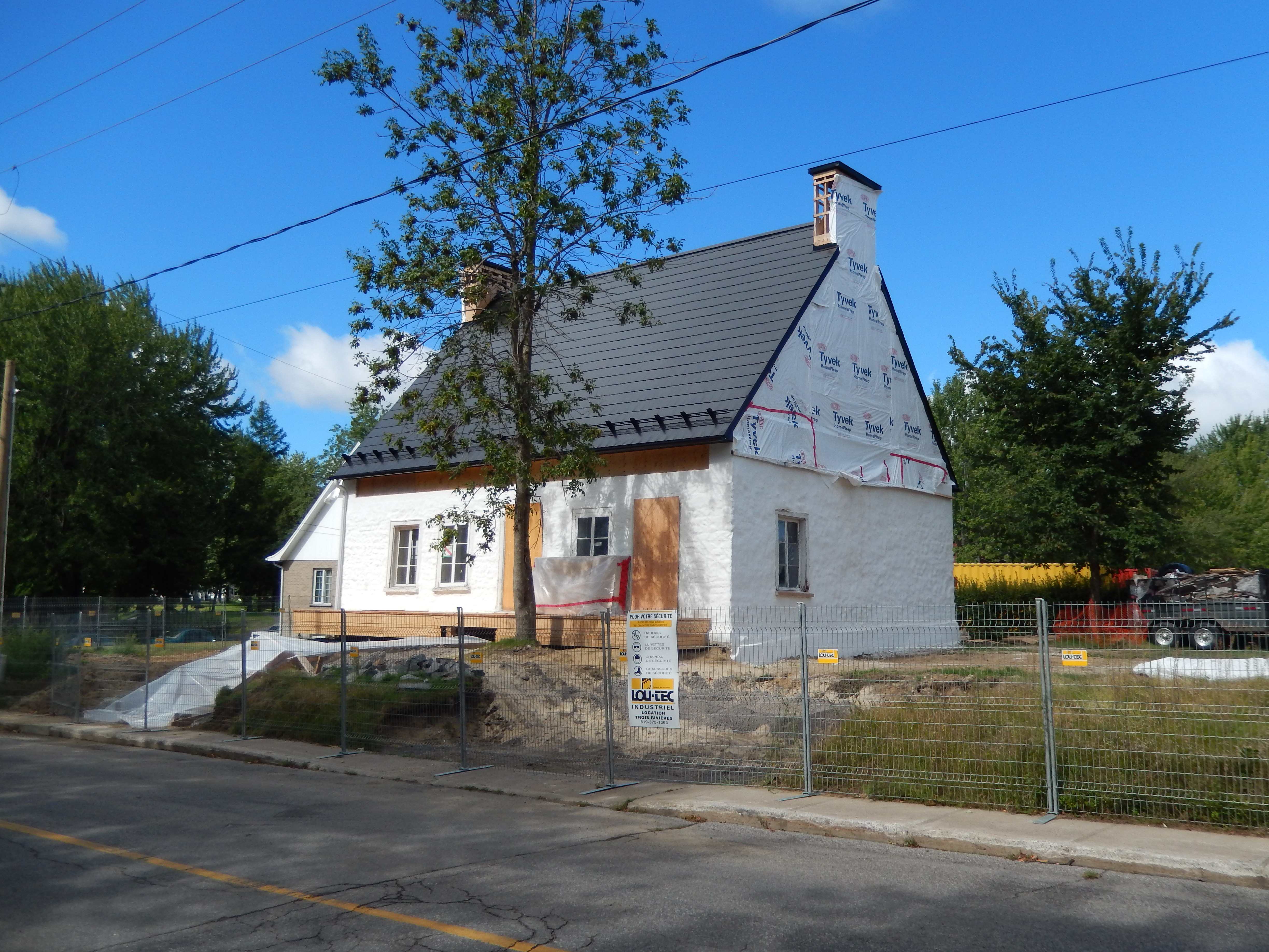 Manoir des Jésuites, 555, rue Notre-Dame Est, Trois-Rivières (Canada). (Protection IP cité. Voir la liste des lieux patrimoniaux de la Mauricie pour plus de détails).